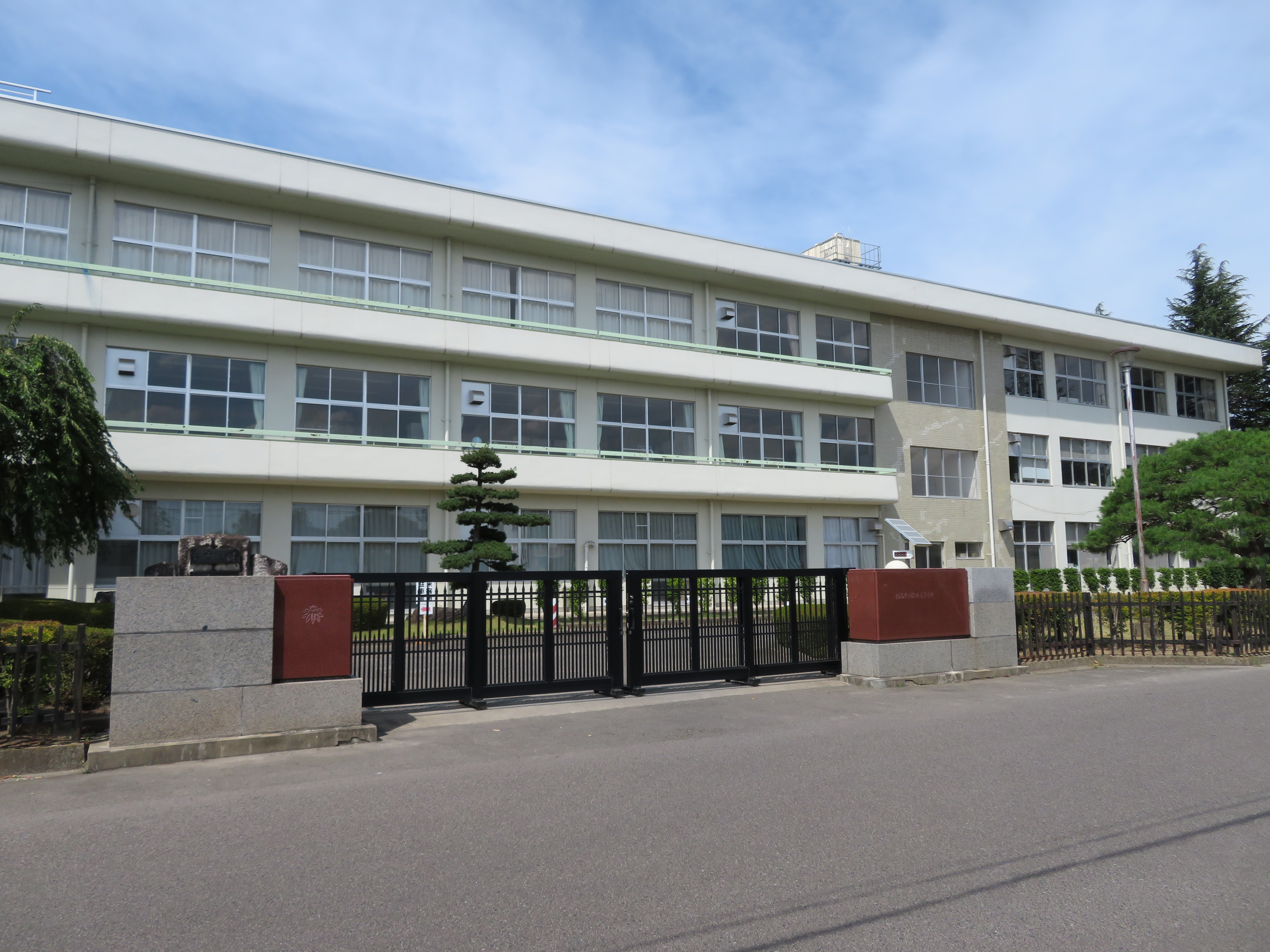 福島県立保原高等学校校舎（正門付近から撮影） Canon PowerShot SX720 HS